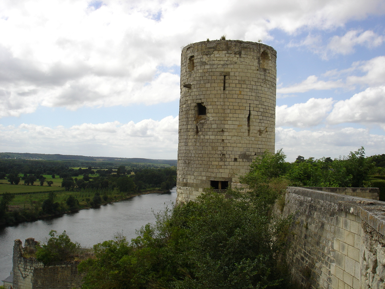 tour du moulin du fort de coudray dans le château de chinon (france 37)